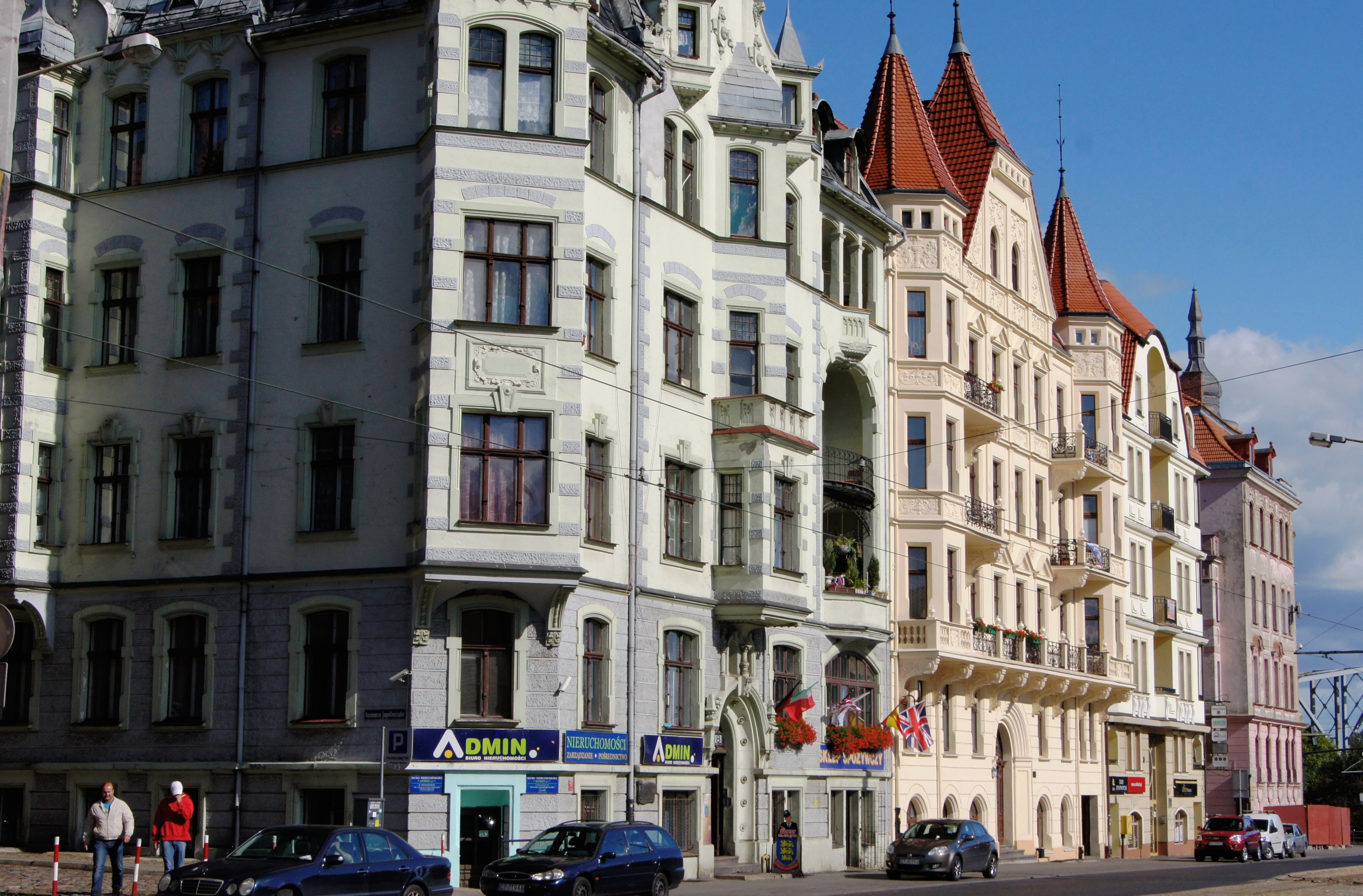 Toruń, kamienice przy ul. Warszawskiej: od prawej: nr 2 (A/1557: kamienica, 1896-98), nr 4, nr 6 i nr 8 (A/906: kamienica, 1897-98)